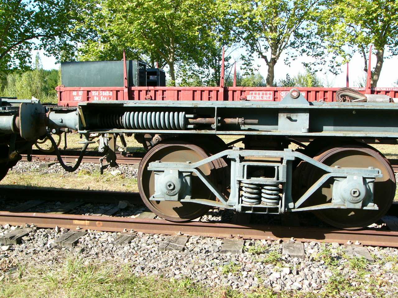 Journées du patrimoine 2005 à Versailles-Matelots - Mécanisme interne d'un tampon et bogie